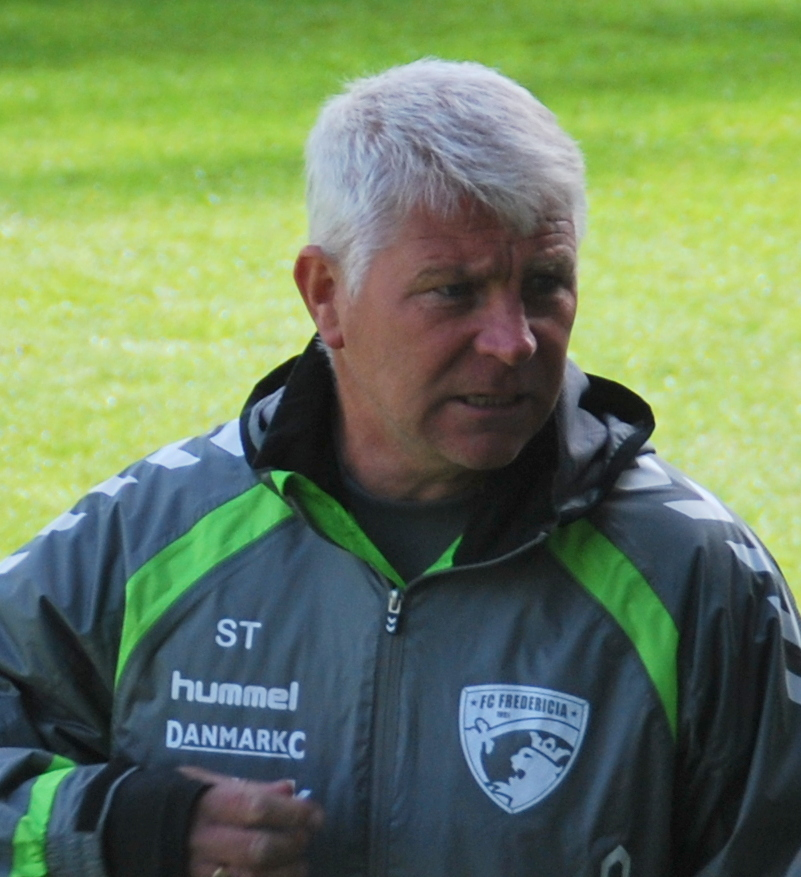 Den tidligere fodboldspiller Steen Thychosen. Her på Viborg Stadion.